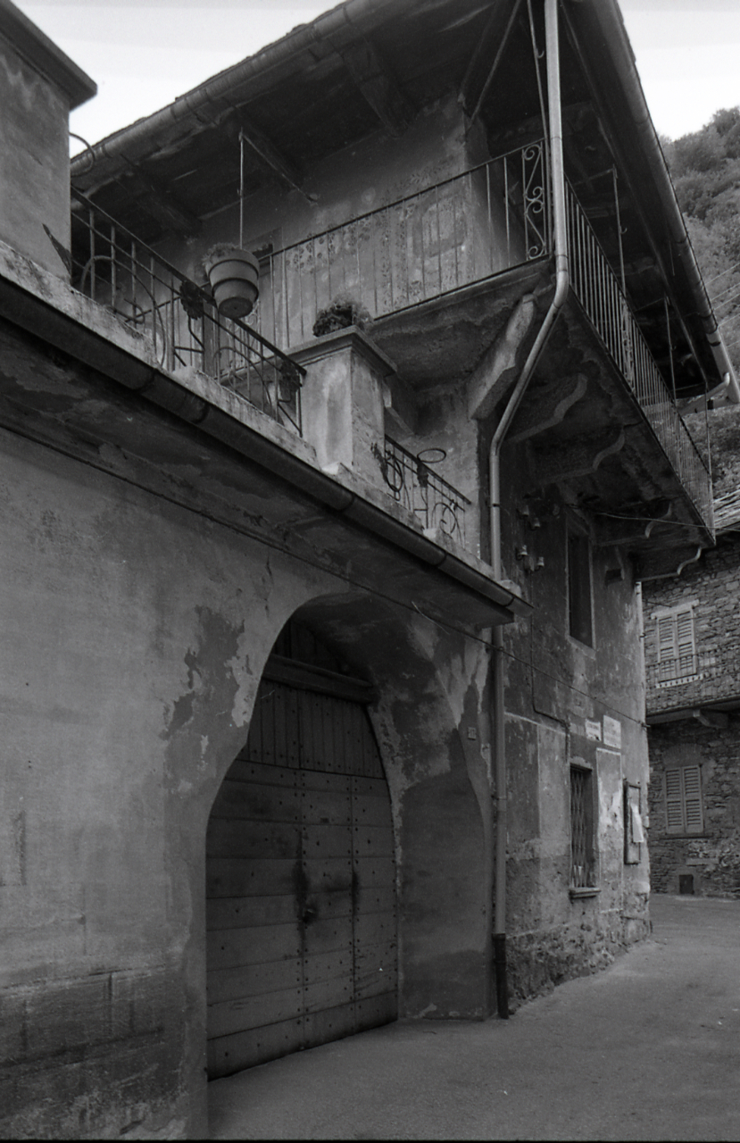 Servizio fotografico : Mergozzo, 1980 / Paolo Monti. - Strisce: 3, Fotogrammi complessivi: 12 : Negativo b/n, gelatina bromuro d'argento/ pellicola ; 35 mm. - ((Sul portanegativi: N[I]K[MA]T-EL FP4 e iscrizione: "Candoglia 1-12/ Fond. Enr. Monti.". - Confronta scheda 3978Lpbn01-12. - Occasione: Documentazione per la pubblicazione: Rizzi Enrico, "Walser: gli uomini della montagna", Valstrona, Lo Strona, 1981